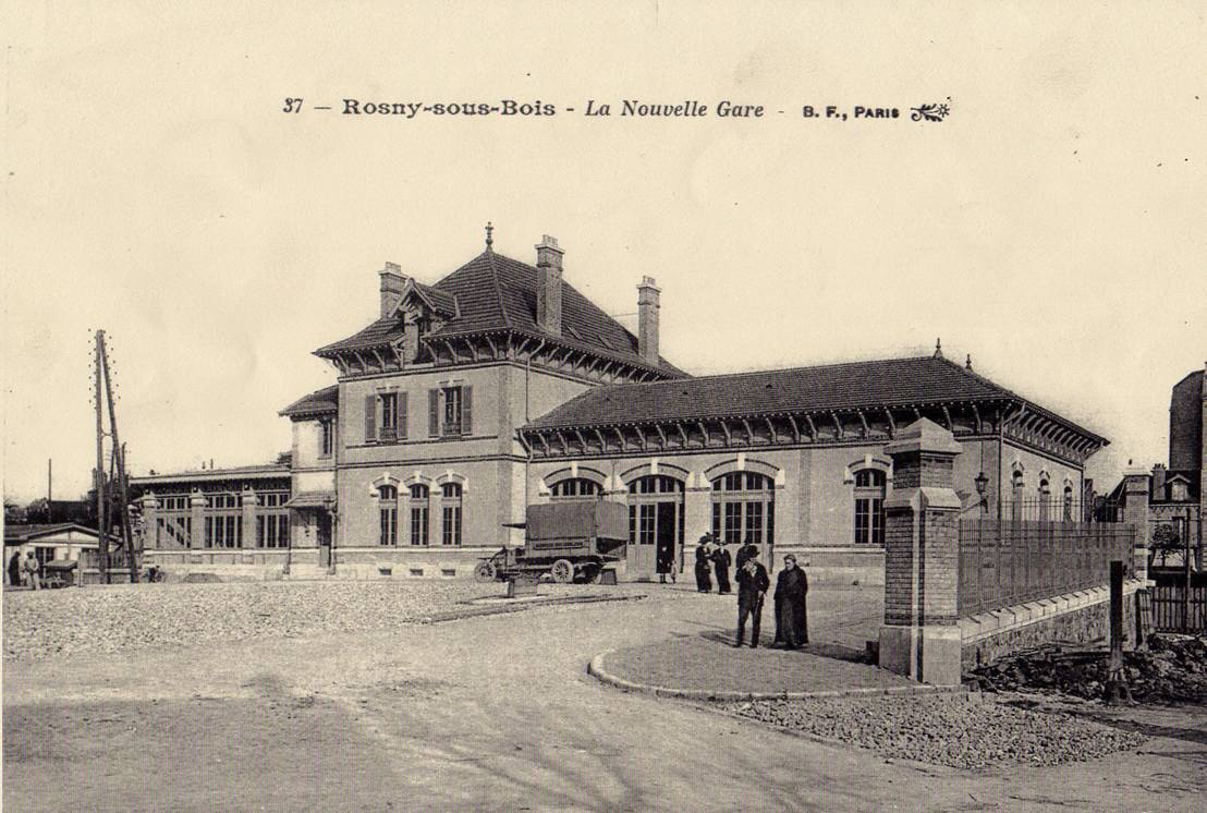 Carte postale ancienne éditée par Berthaud frères (BF) à Paris, N°37 Gare de Rosny-sous-Bois (bâtiment de 1912).